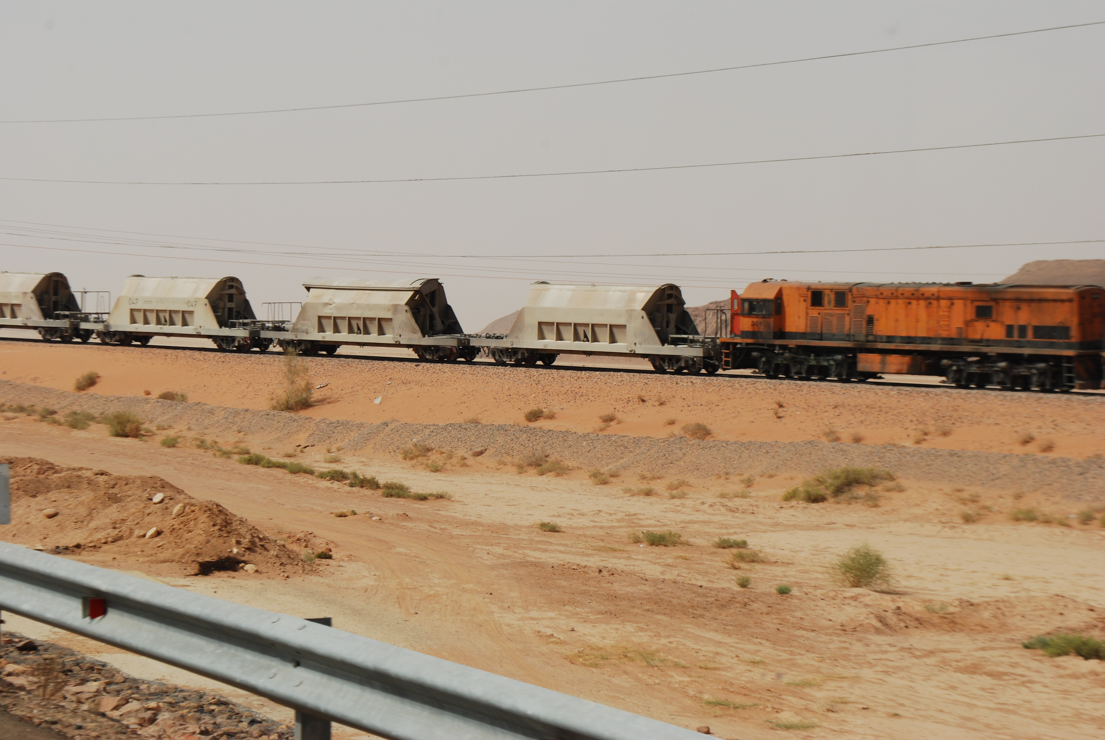 Le transport de phosphate sur le chemin de fer du Hejaz, convoi remontant la voie vers les mines de Ma'an.